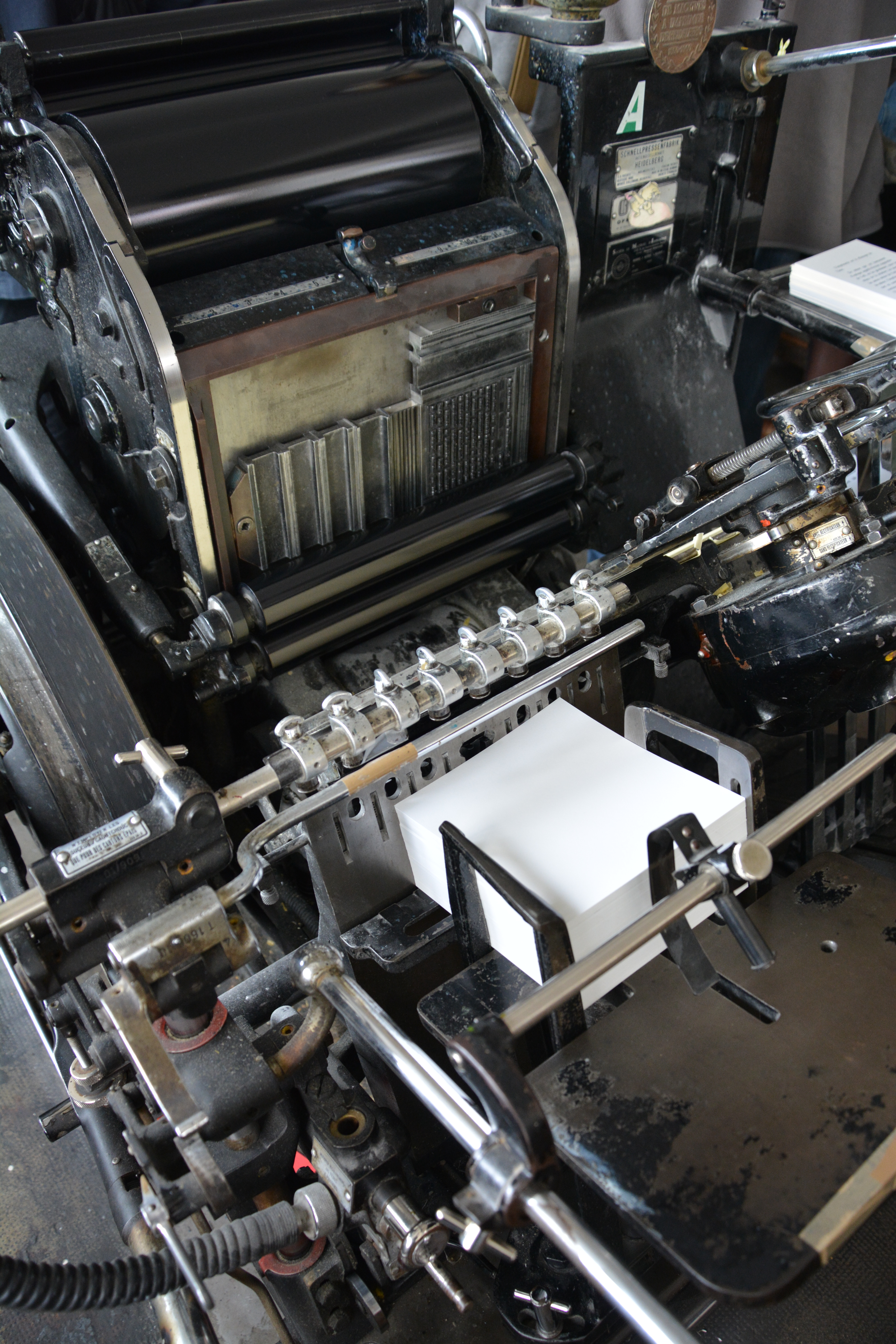 Machines d'imprimerie - Imprimerie PAM